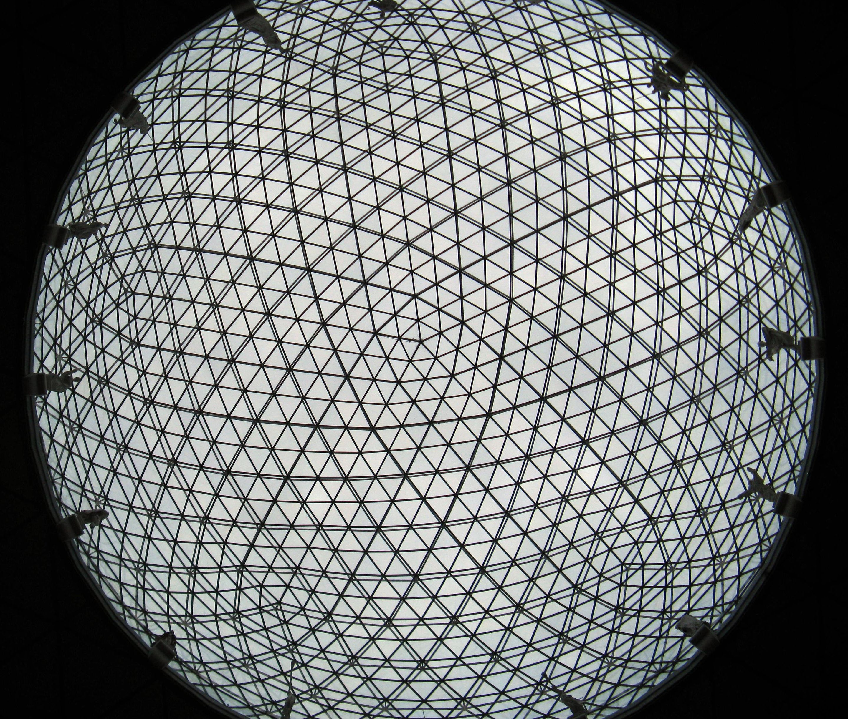 Dali-Museum in Figueres/Spanien: Glaskuppel über der Krypta